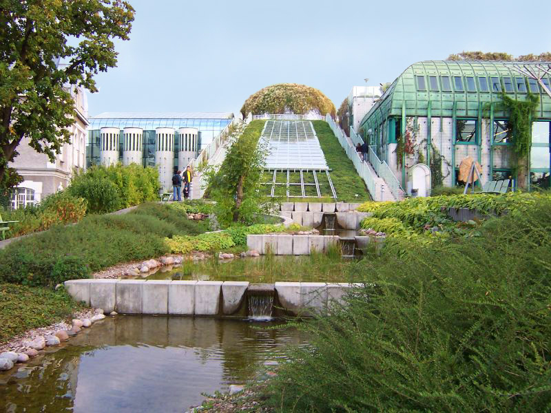 Warsaw - Library